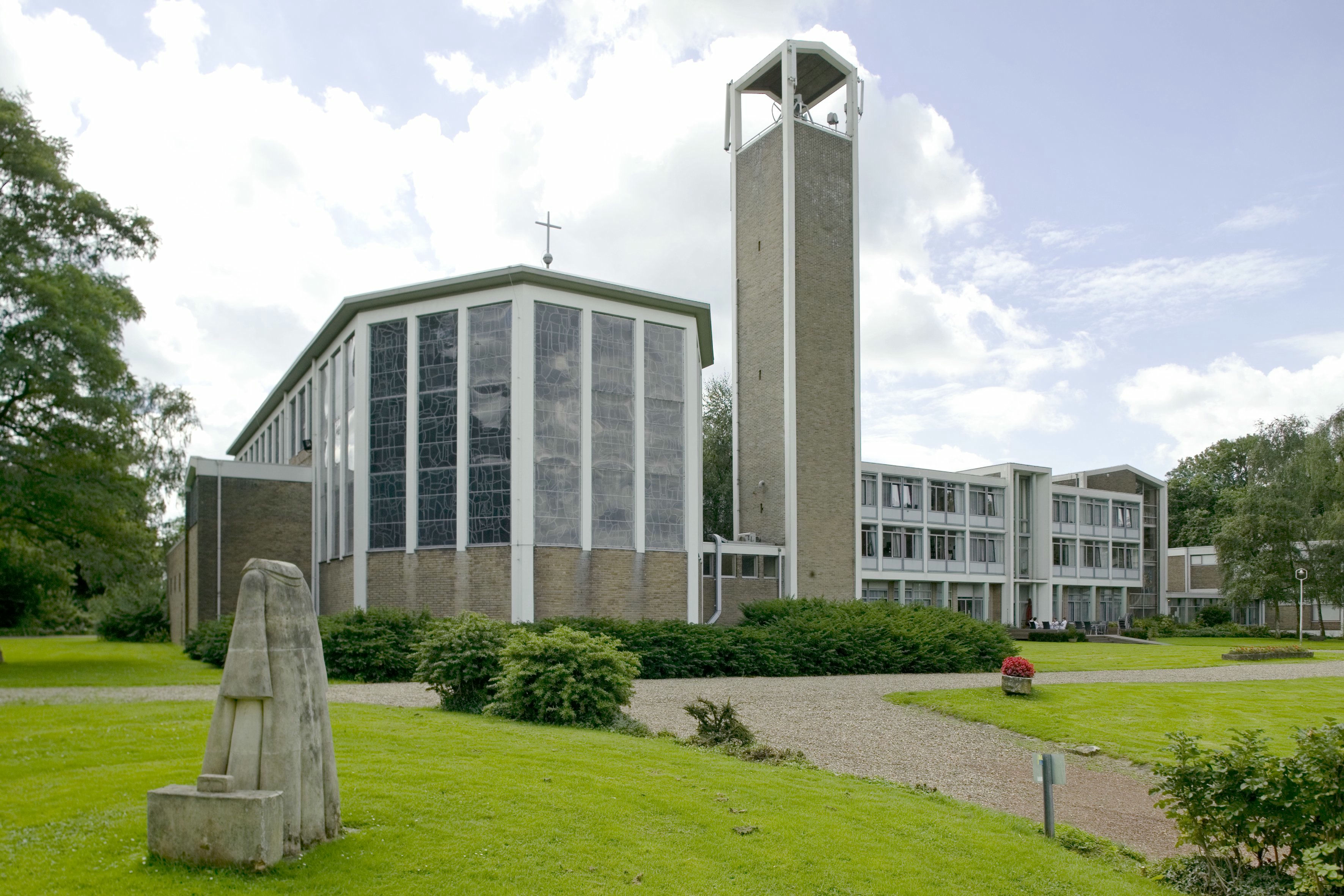 Missiehuis Societeit Voor Afrikaanse Missien: Overzicht van de kooromgang van de kerk met toren (opmerking: Gefotografeerd voor Monumenten van Herrezen Nederland)